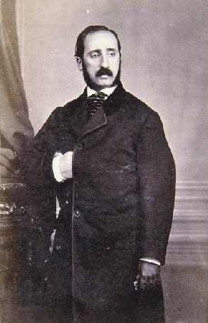 Eusebio Valldeperas, fotografía de J. Laurent. Museo de Historia de Madrid